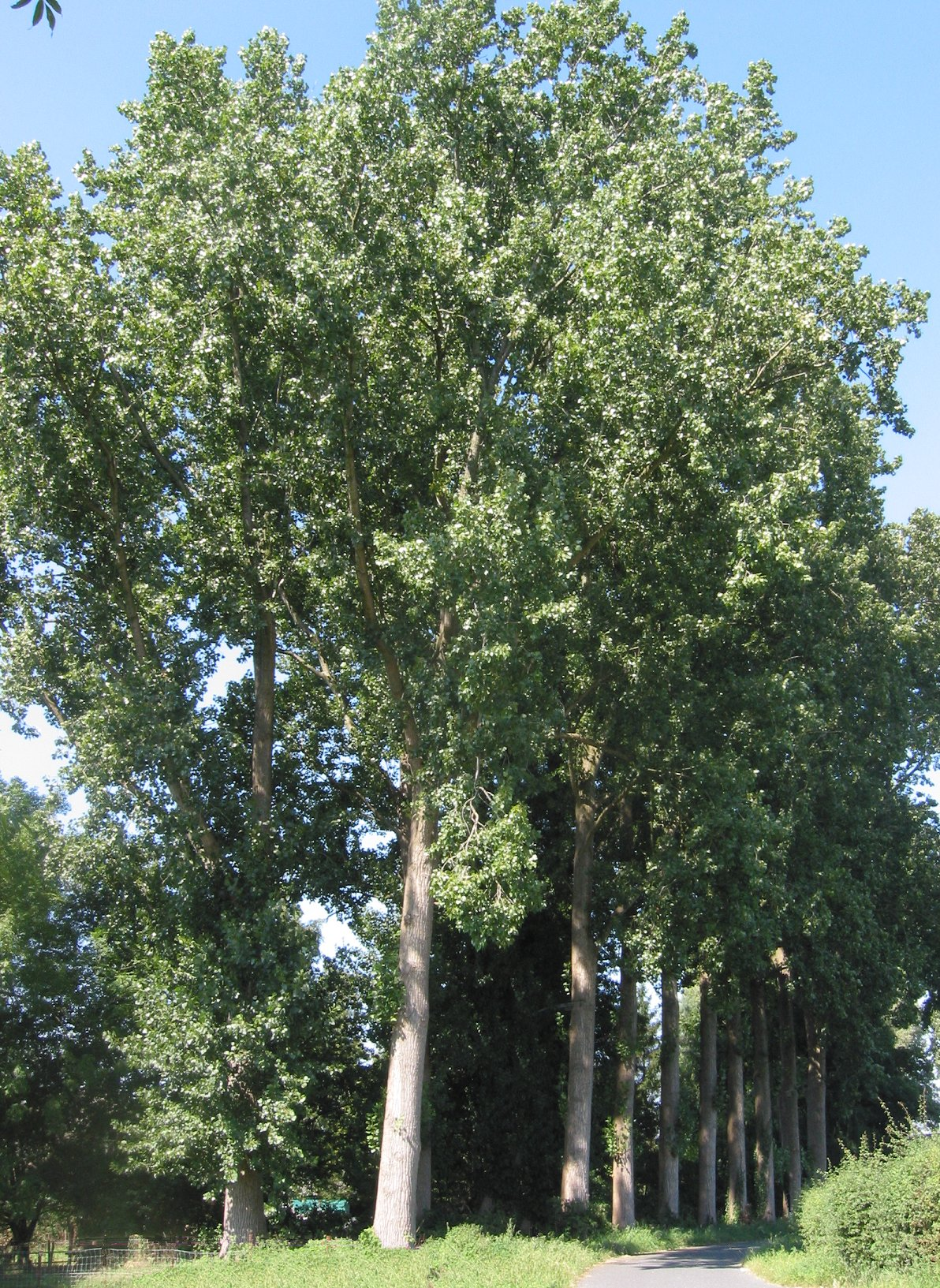 (nl: Euramerikaanse populier) Populus canadensis